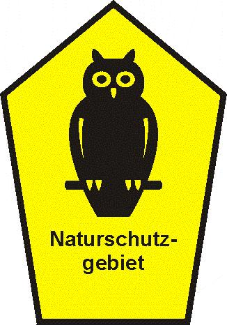 Naturschutzgebiet.